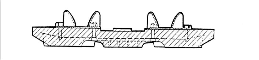 применяется на снегоболотоходах ГАЗ-3351